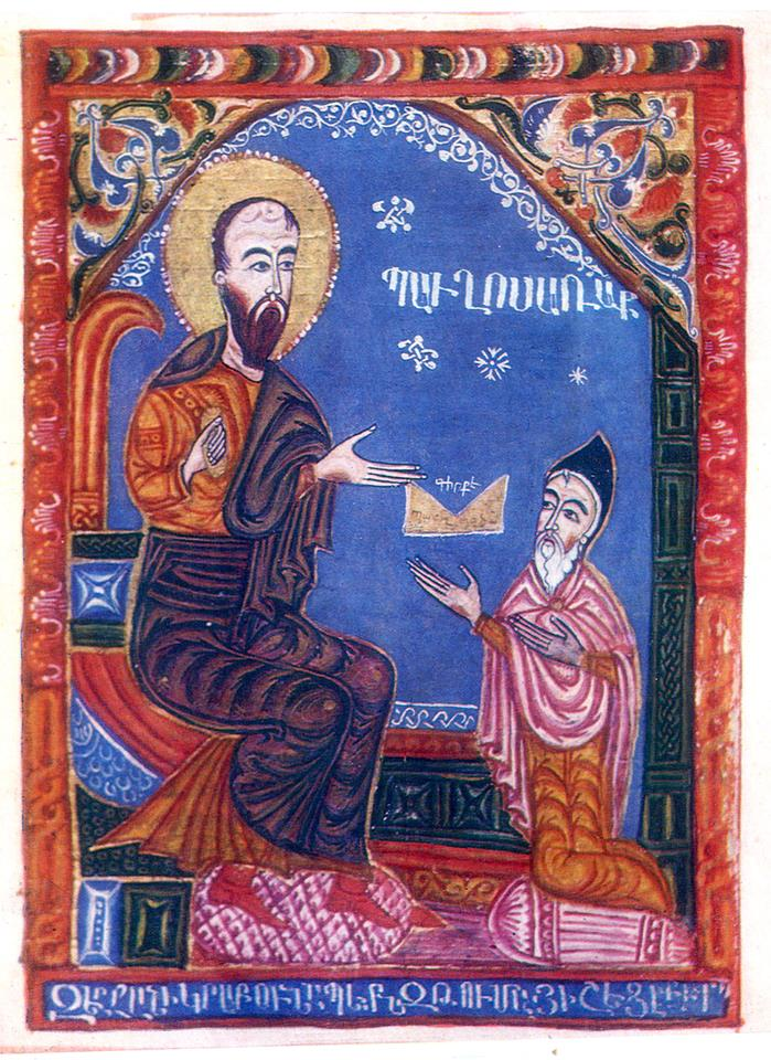 Товма Мецопеци и апостол Павел.